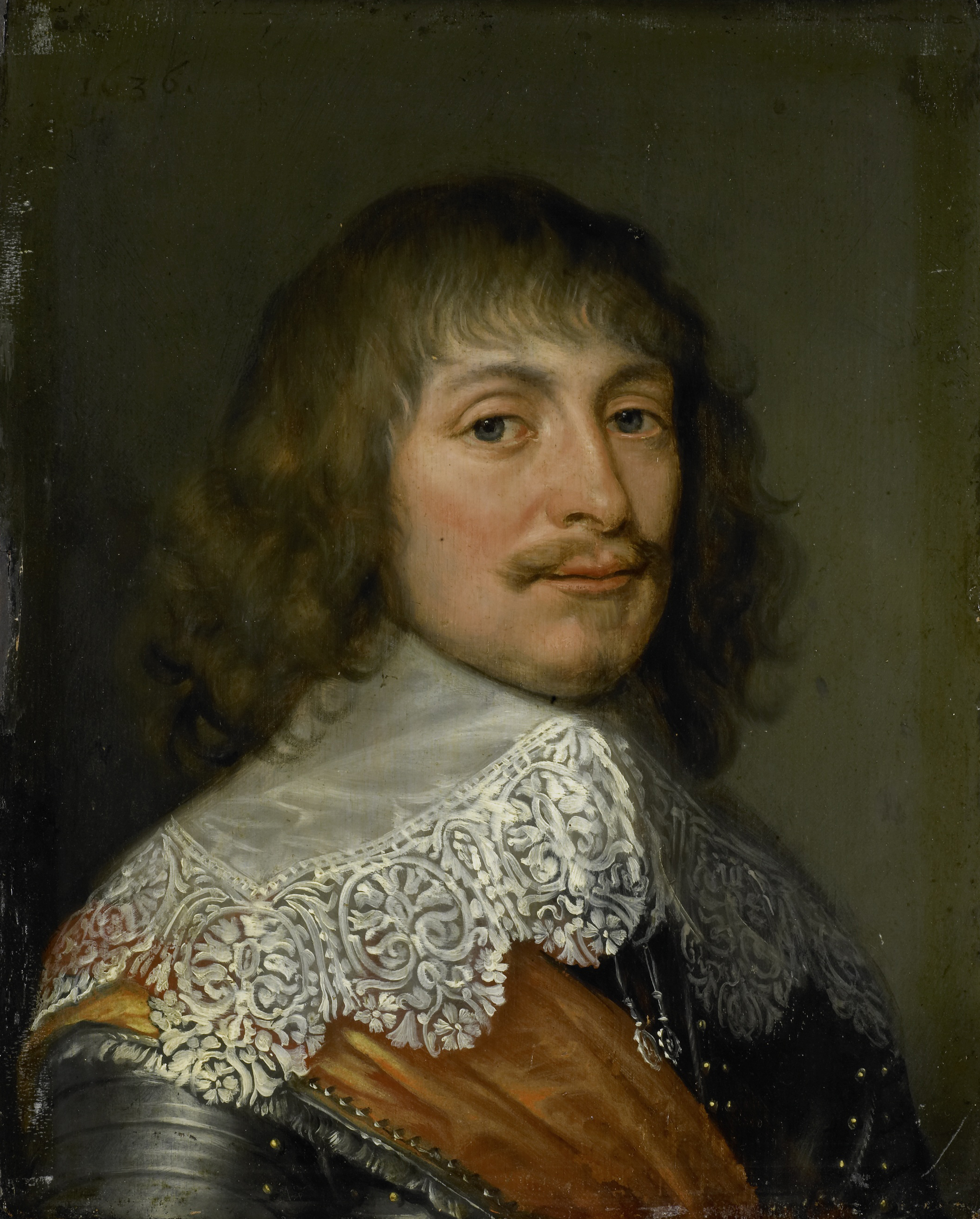 Portret van George Frederik (1606-74), vorst van Nassau-Siegen. Buste naar rechts, in wapenrusting. Collection: schilderijen; Katzenelnbogen serie